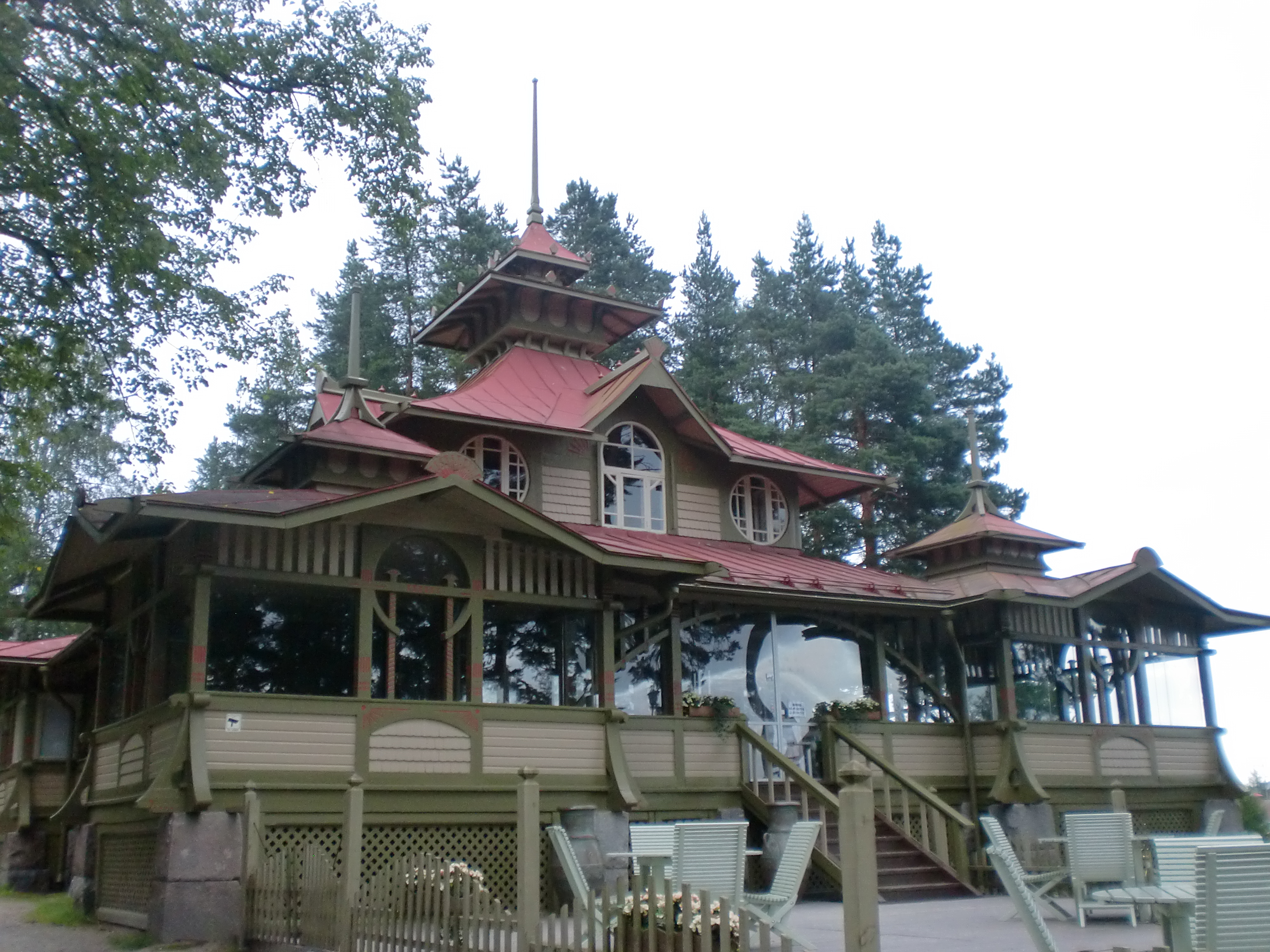 Harjupaviljonki